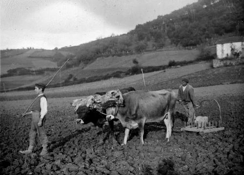 Aretxabaletako nekazariak area pasatzen. 1915.